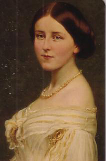 Estefânia Frederica Guilhermina Antônia DE Hohenzollern Sigmaringen, esposa de Pedro V de Portugal.